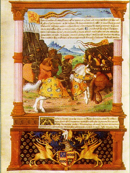 Robert Stuart de Darnley, seigneur d'Aubigny (France, Berry)